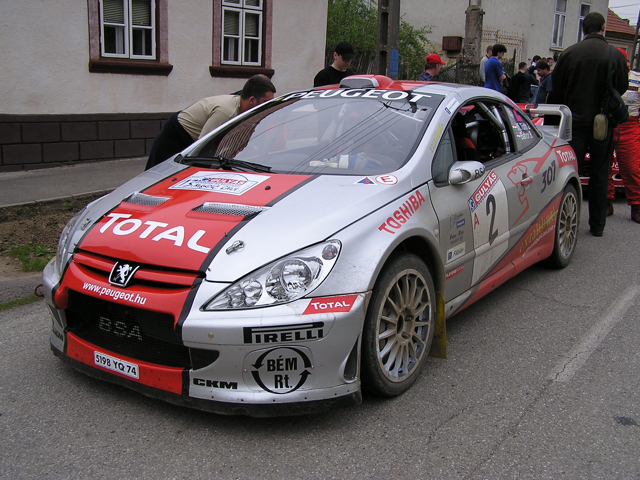 Hungary-Miskolc Rally